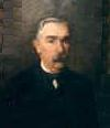 Portrait du poète portugais António Xavier Rodrigues Cordeiro, fin du XIXe siècle.